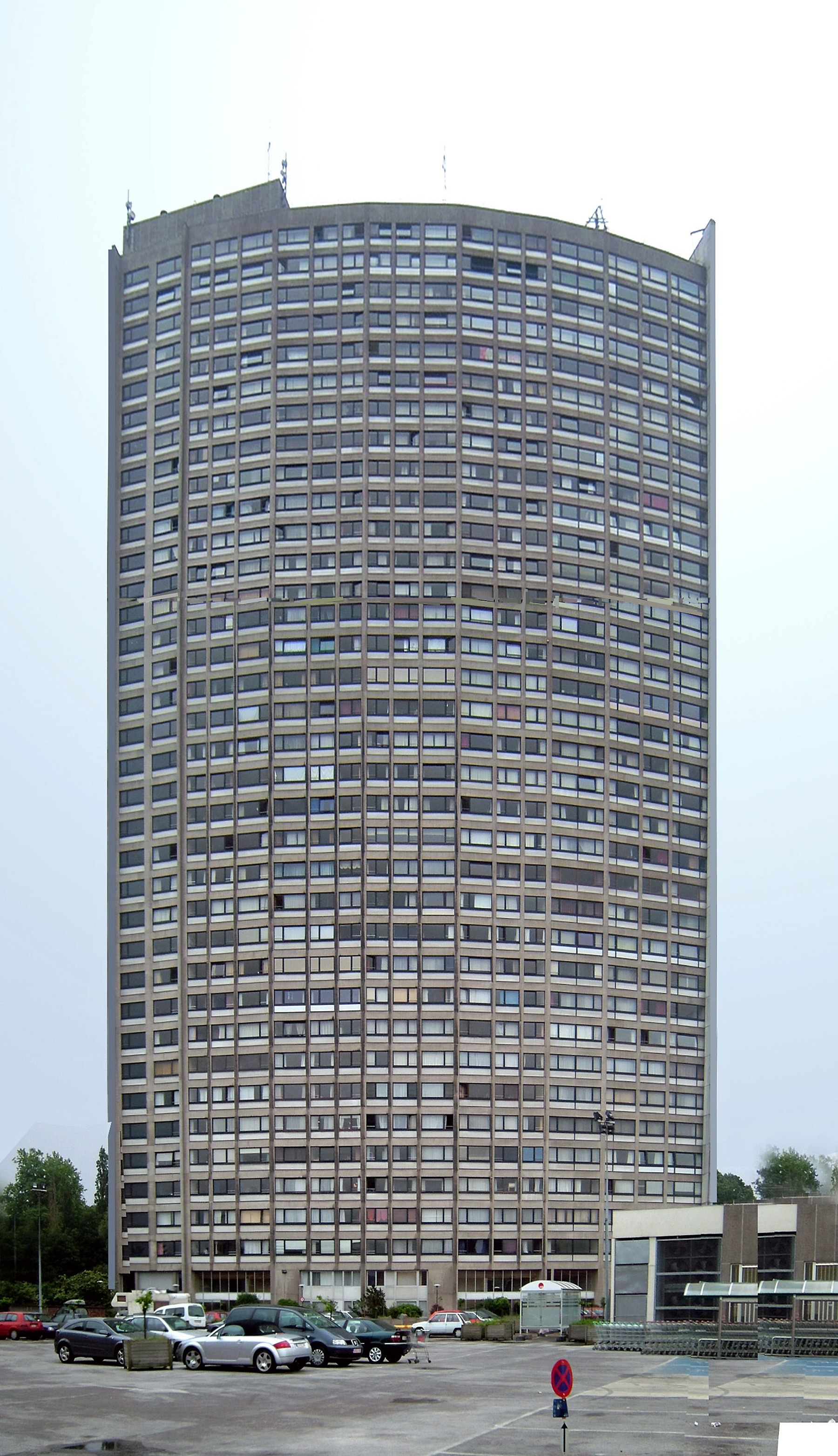 Tour Brusilia